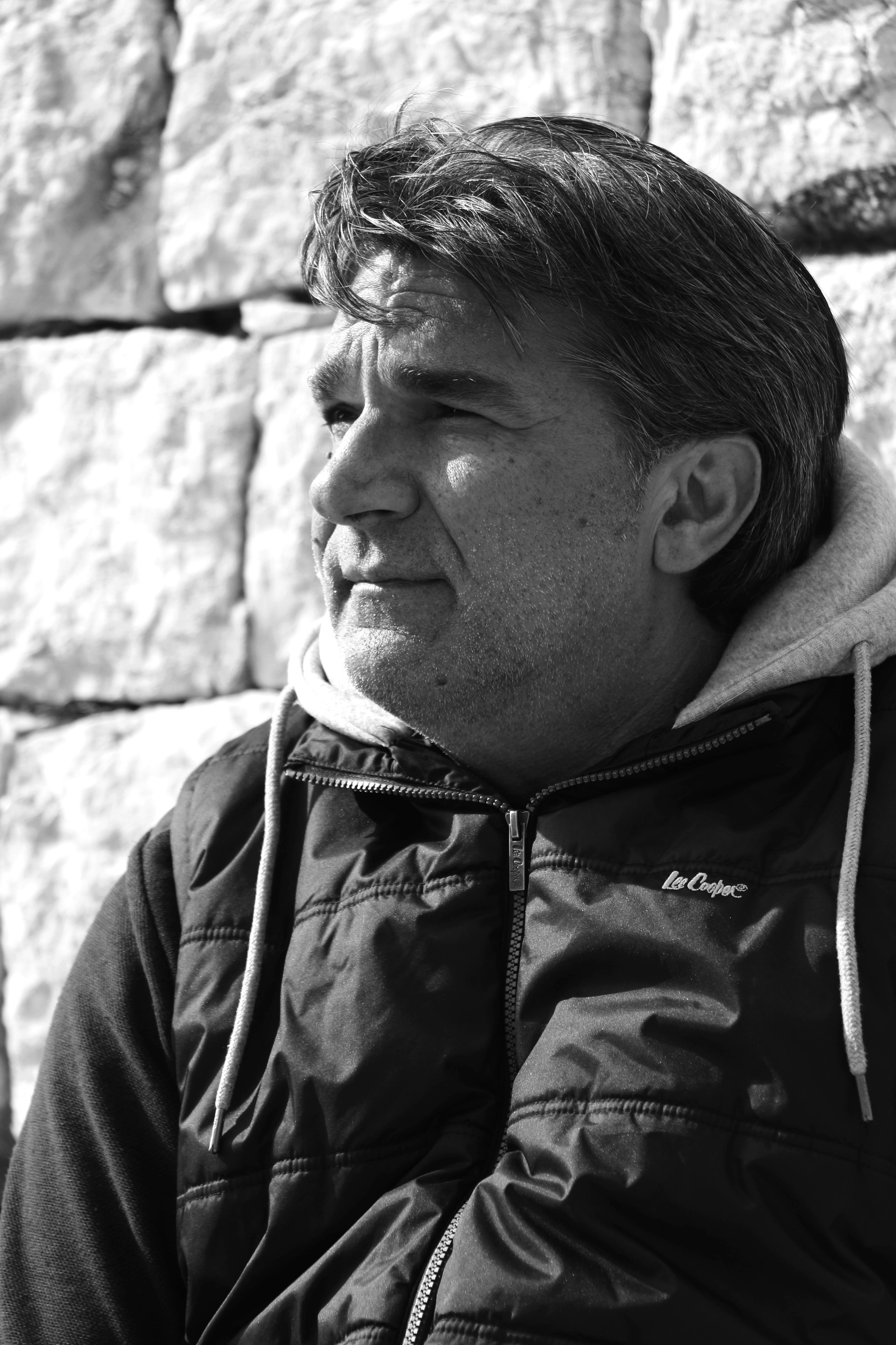 Milko Peko, schrijver uit Croatië